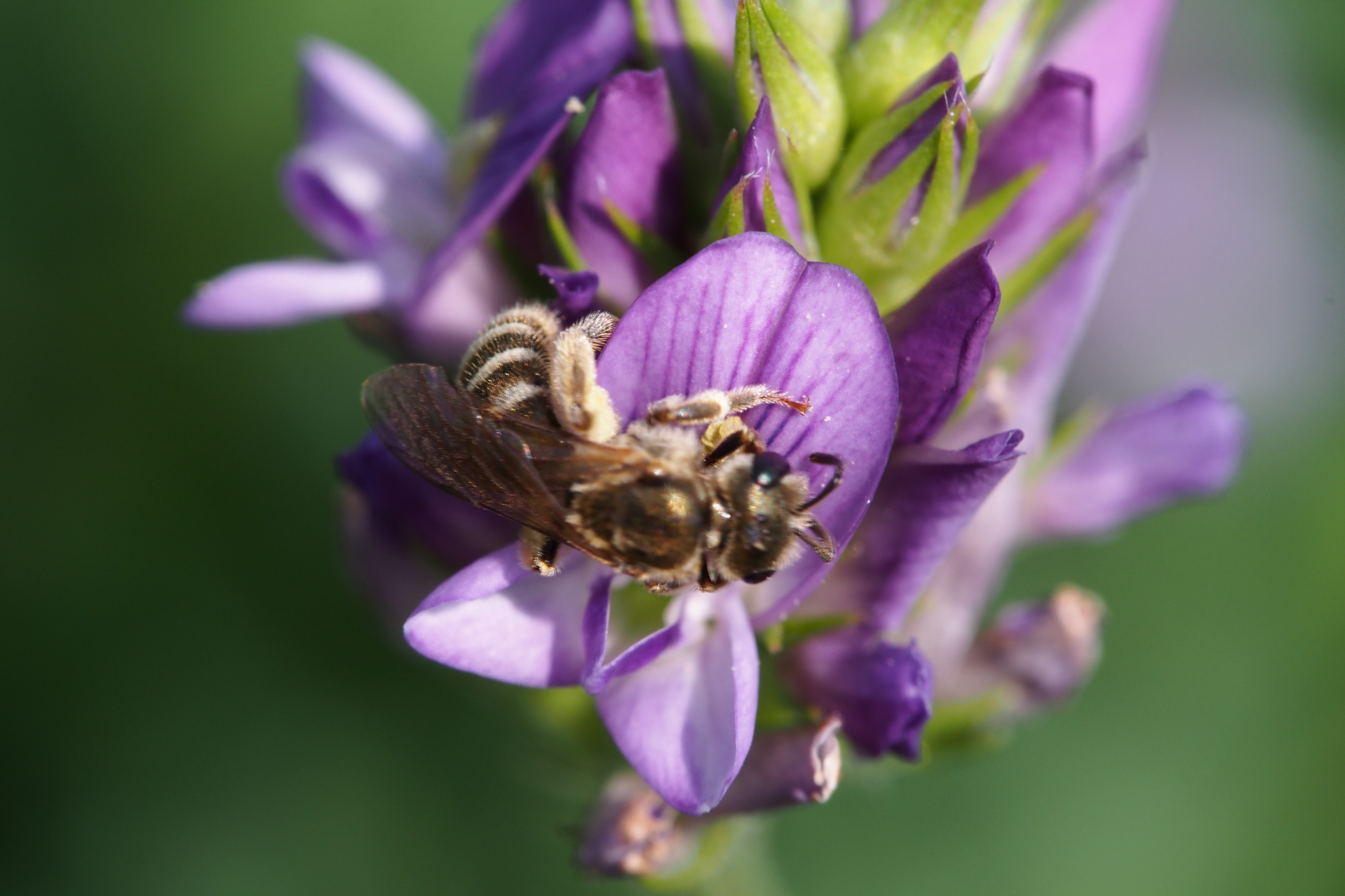 豊平川